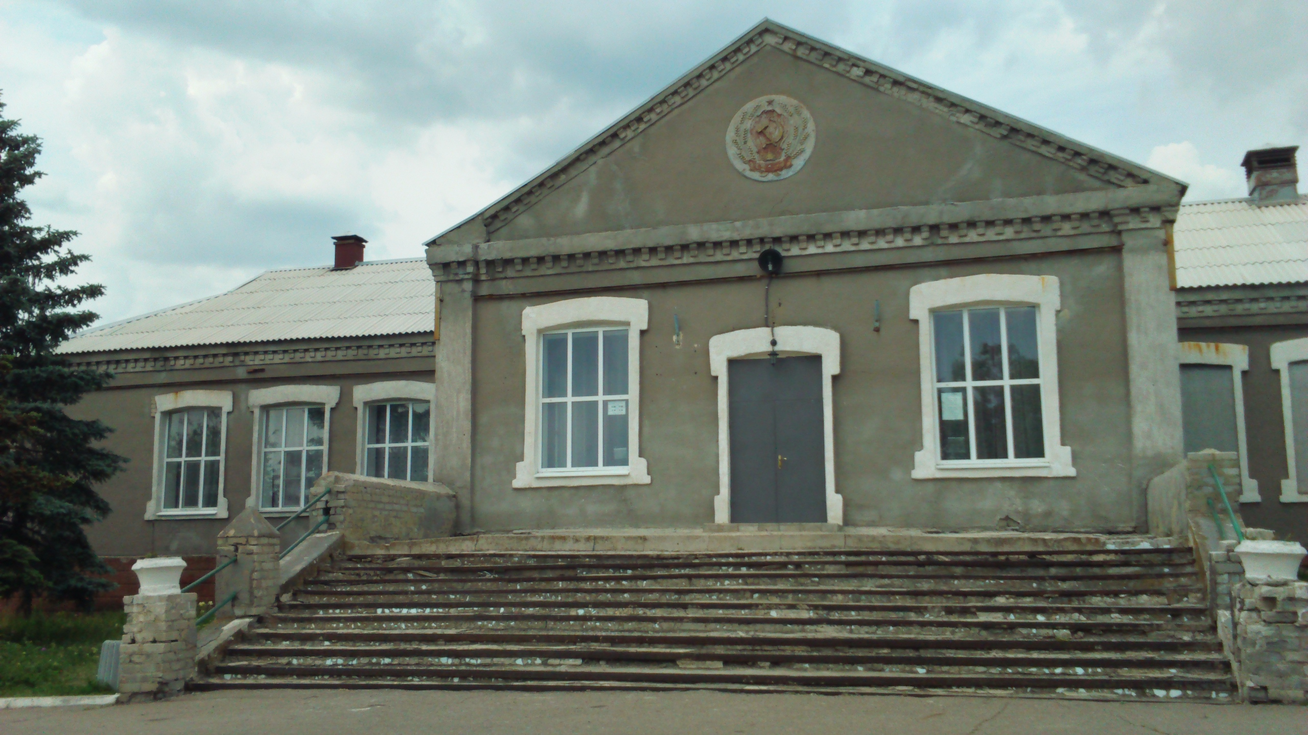 Будинок культури в селі Никанорівка Добропільський район.